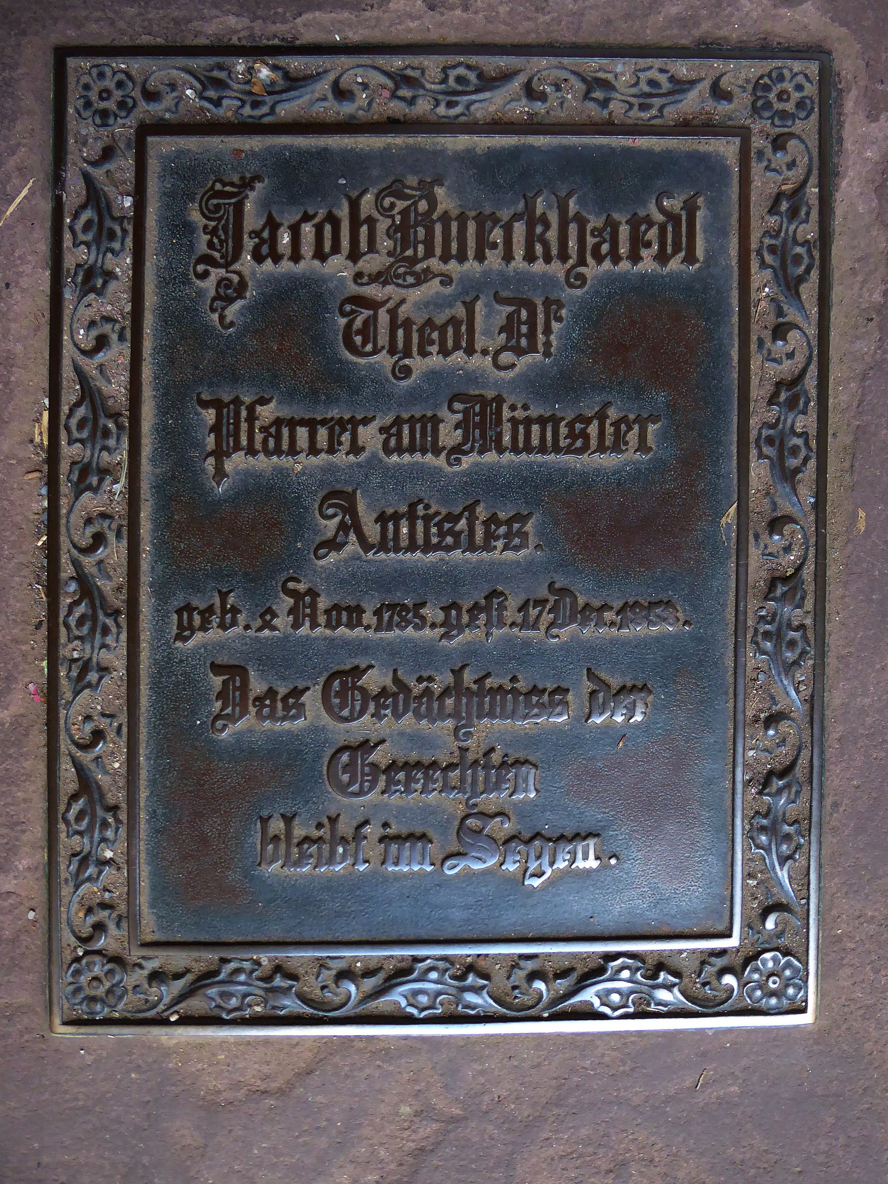 akob Burckhardt der Ältere (1785–1858) Theologe, Antistes der reformierten Kirche in Basel. Epitaphien (Grabtafeln) im gotische Doppelkreuzgang (15. Jh.) des Basler Münster.